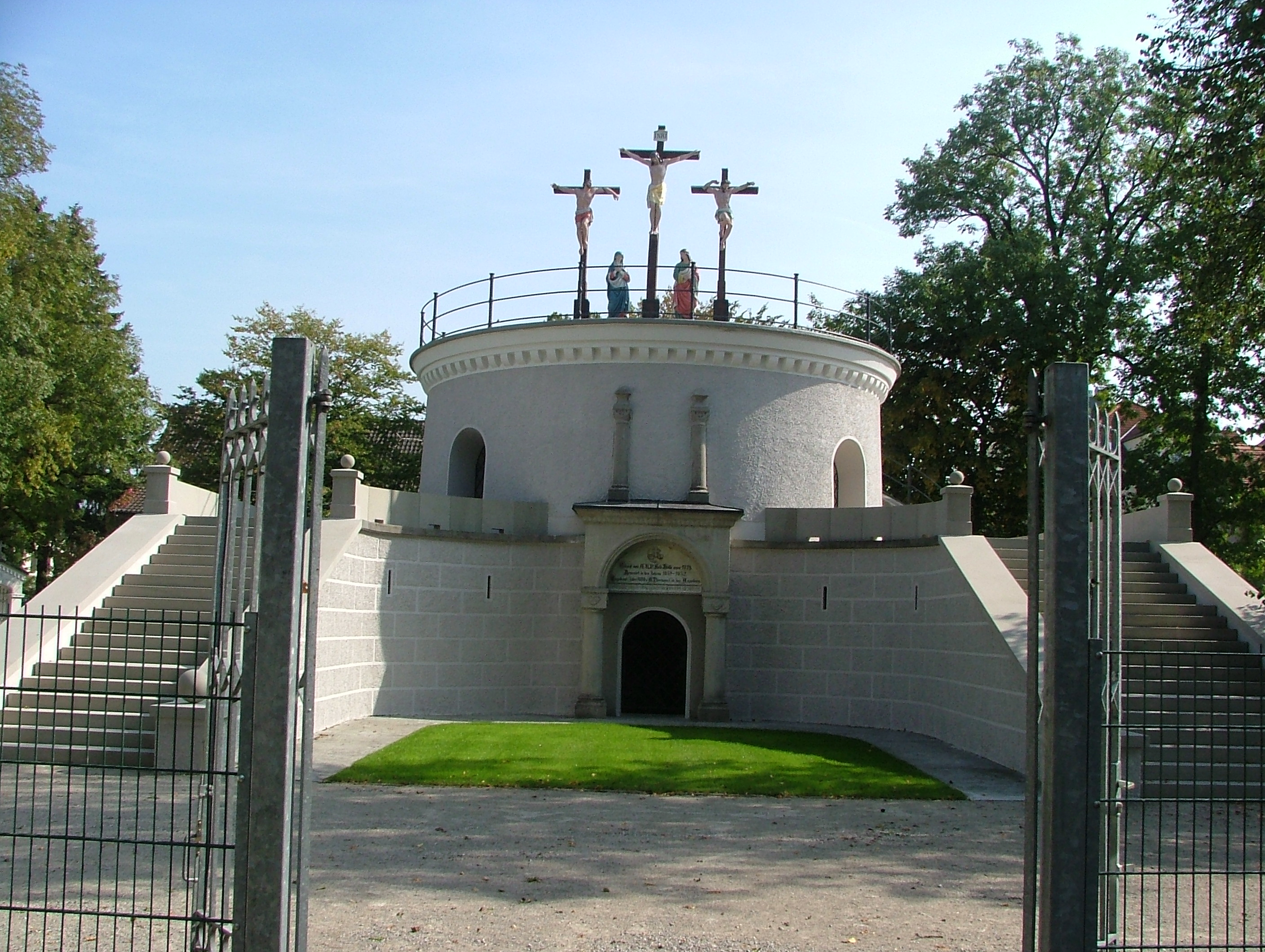 Kalvarienberg